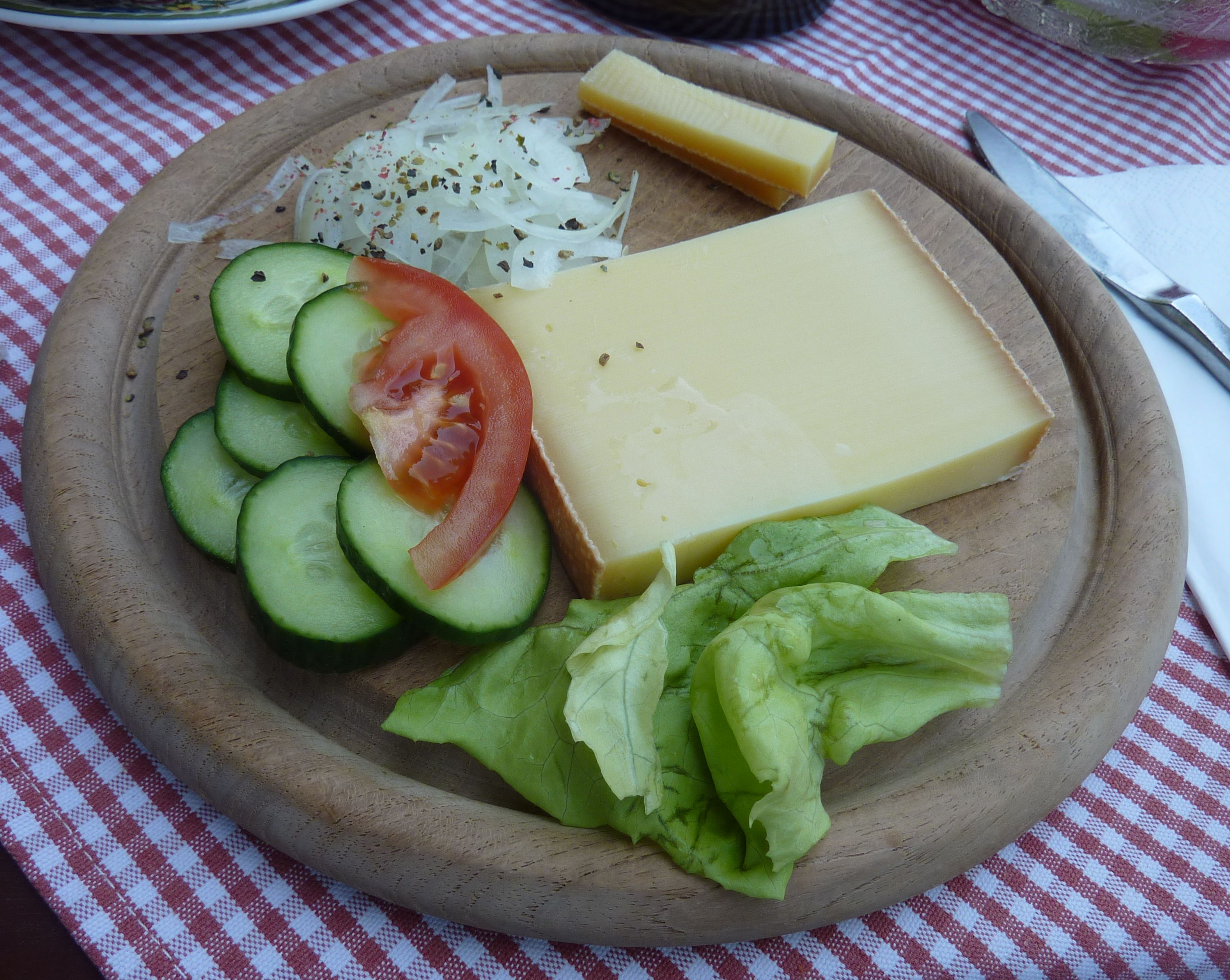 Allgäuer Bergkäse